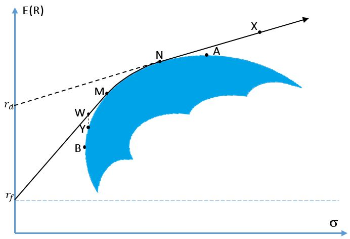 Feasible set with Markowitz frontier (BA) lending frontier (rfMNA) borrowing frontier (BMNX) and lending borrowing frontier (rfMNX), own work